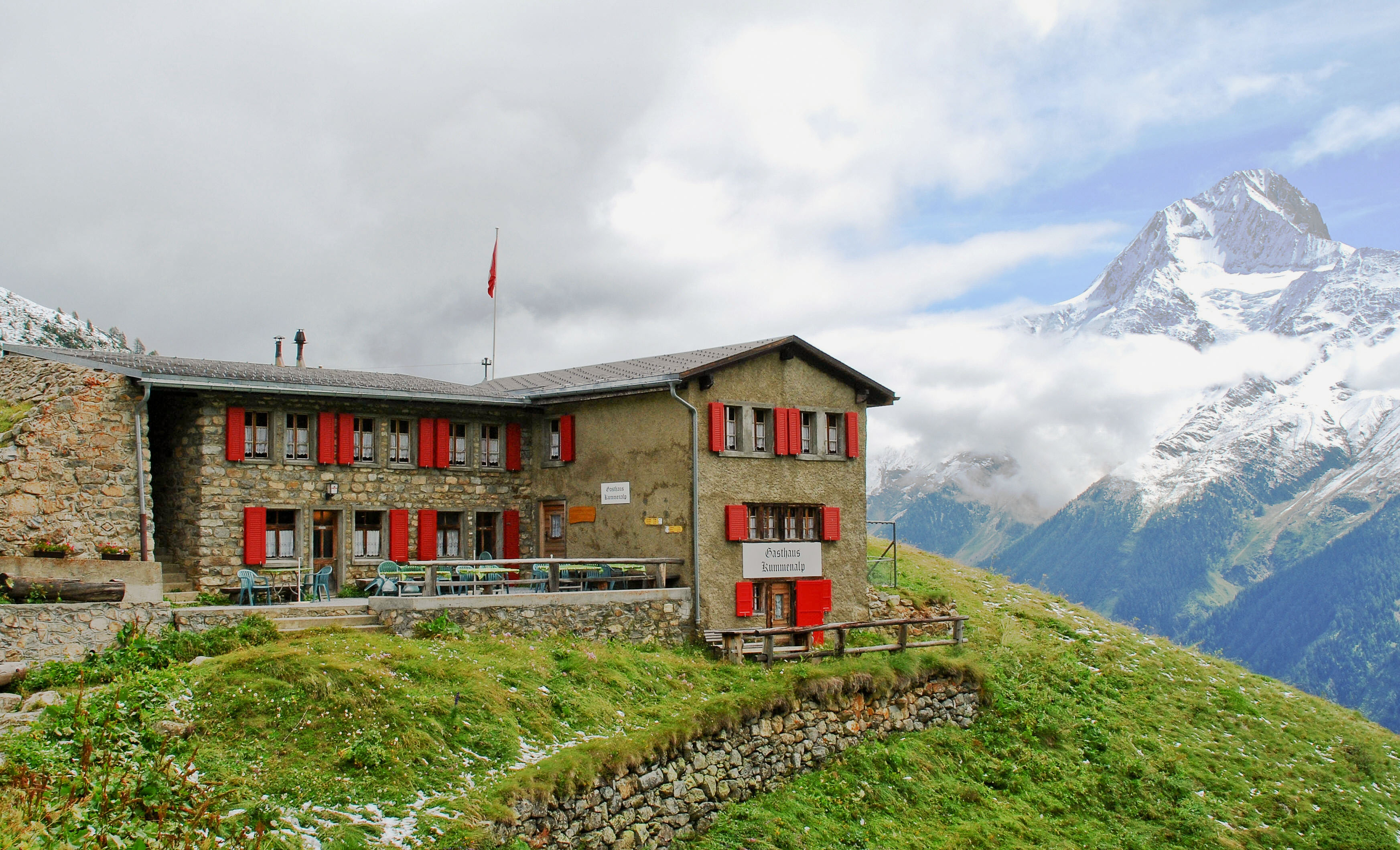 en.: Kummenalp at Lötschental, Switzerland; dt.: Kummenalp mit Bietschhorn im Lötschental, Schweiz